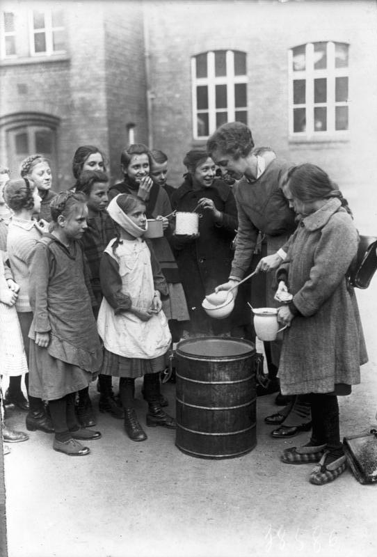 Berlin, Essen für bedürftige Kinder Scherl: Berlin 1924 Speisung für arme Kinder in Berlin. 1051-24